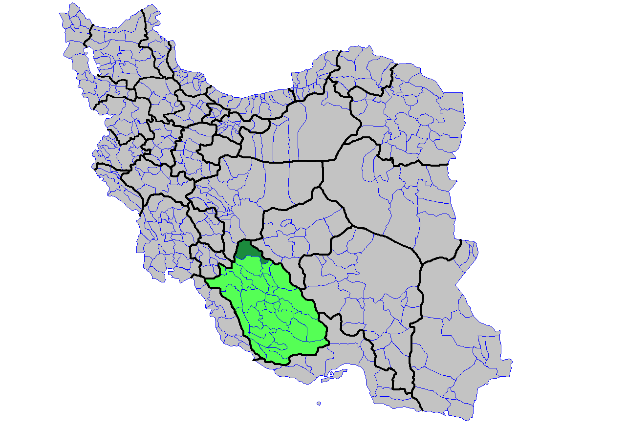 La carte de la comte d'Abade